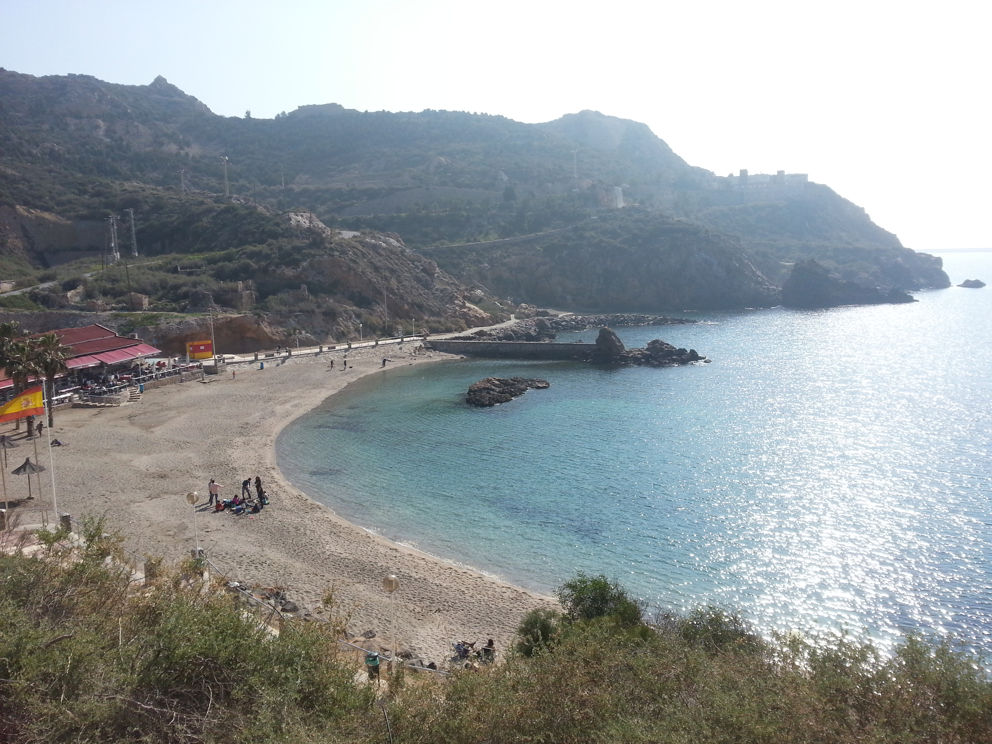 Pequeña cala situada en el municipio de Cartagena, al sur de la Región de Murcia